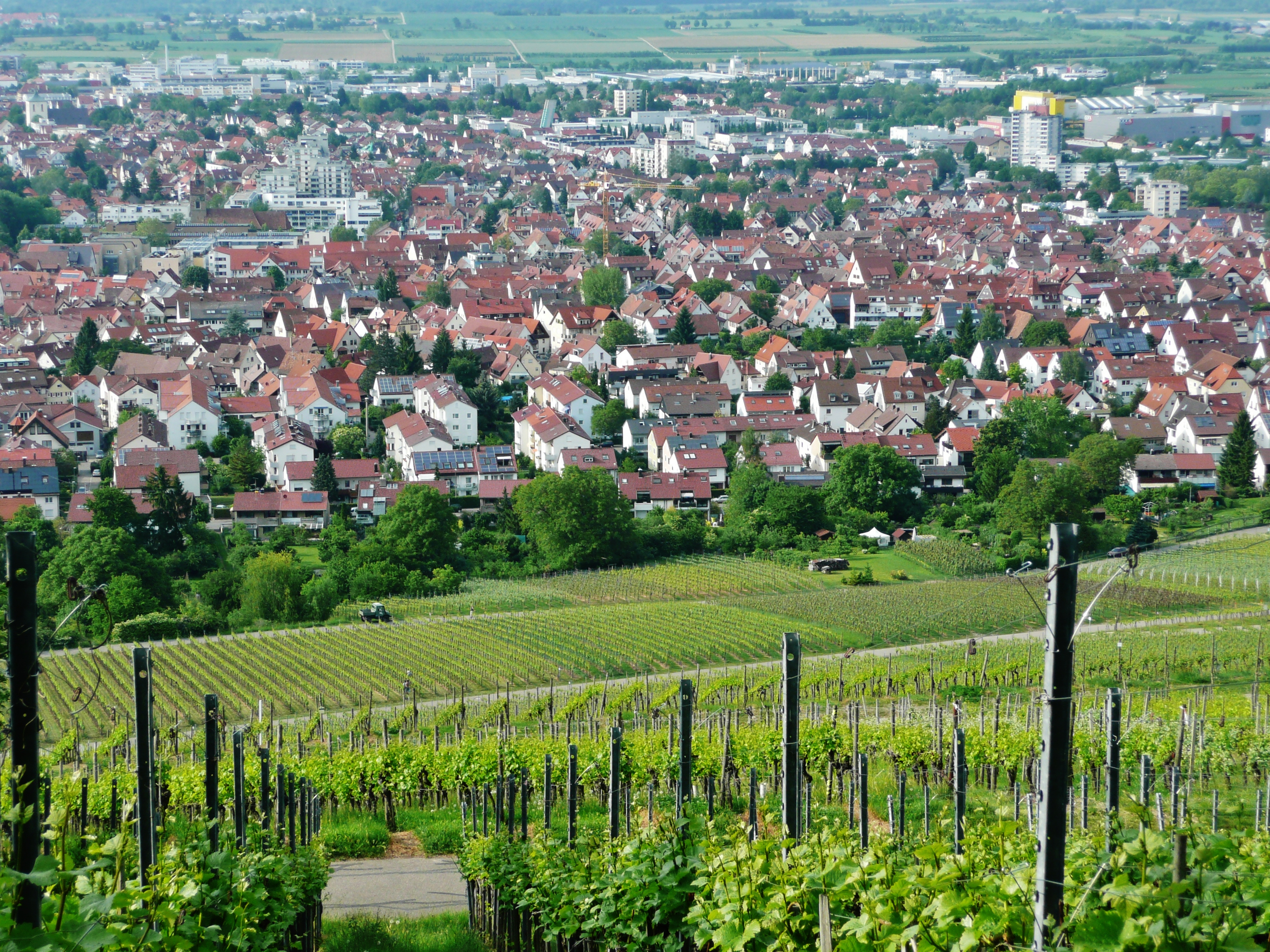 Fellbach